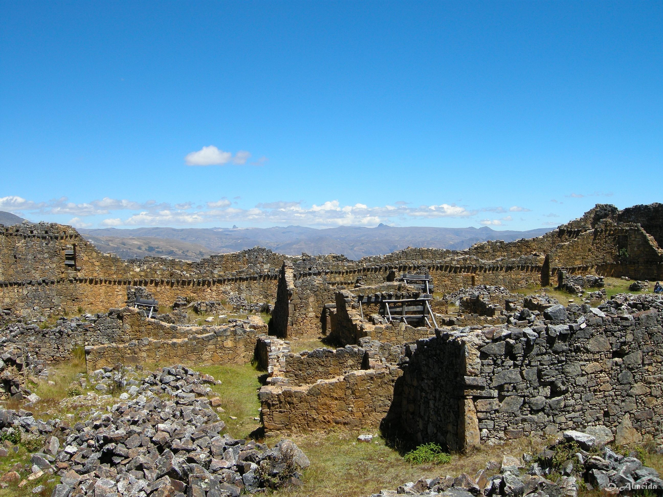 Marcahuamachuco: Galería circular de Las Monjas